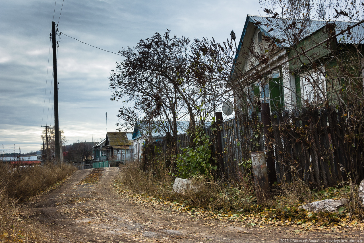 Улица села Курумоч, Самарская область, Россия